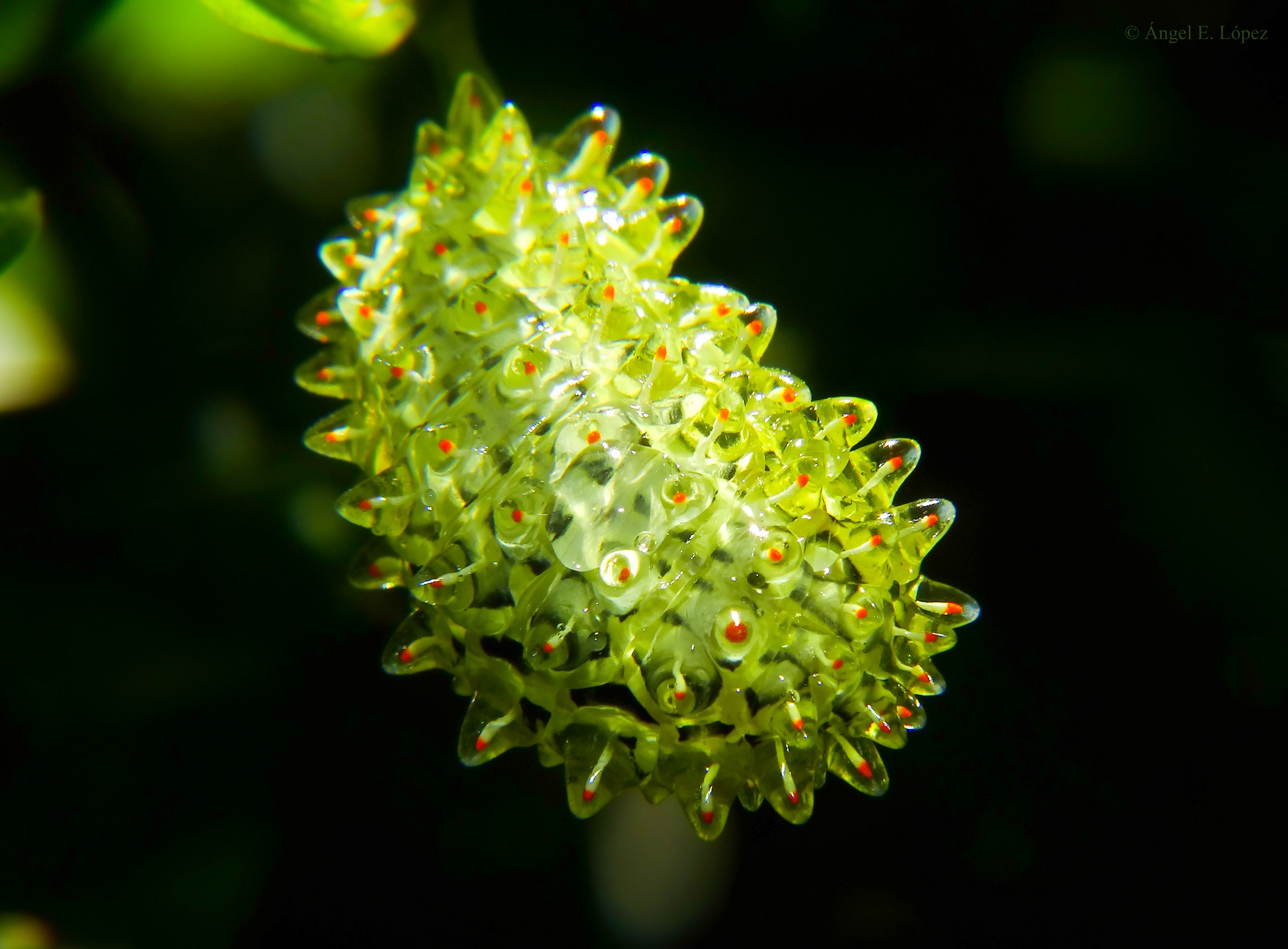 Oruga de Acraga Coa. Observación en Oaxaca, México.